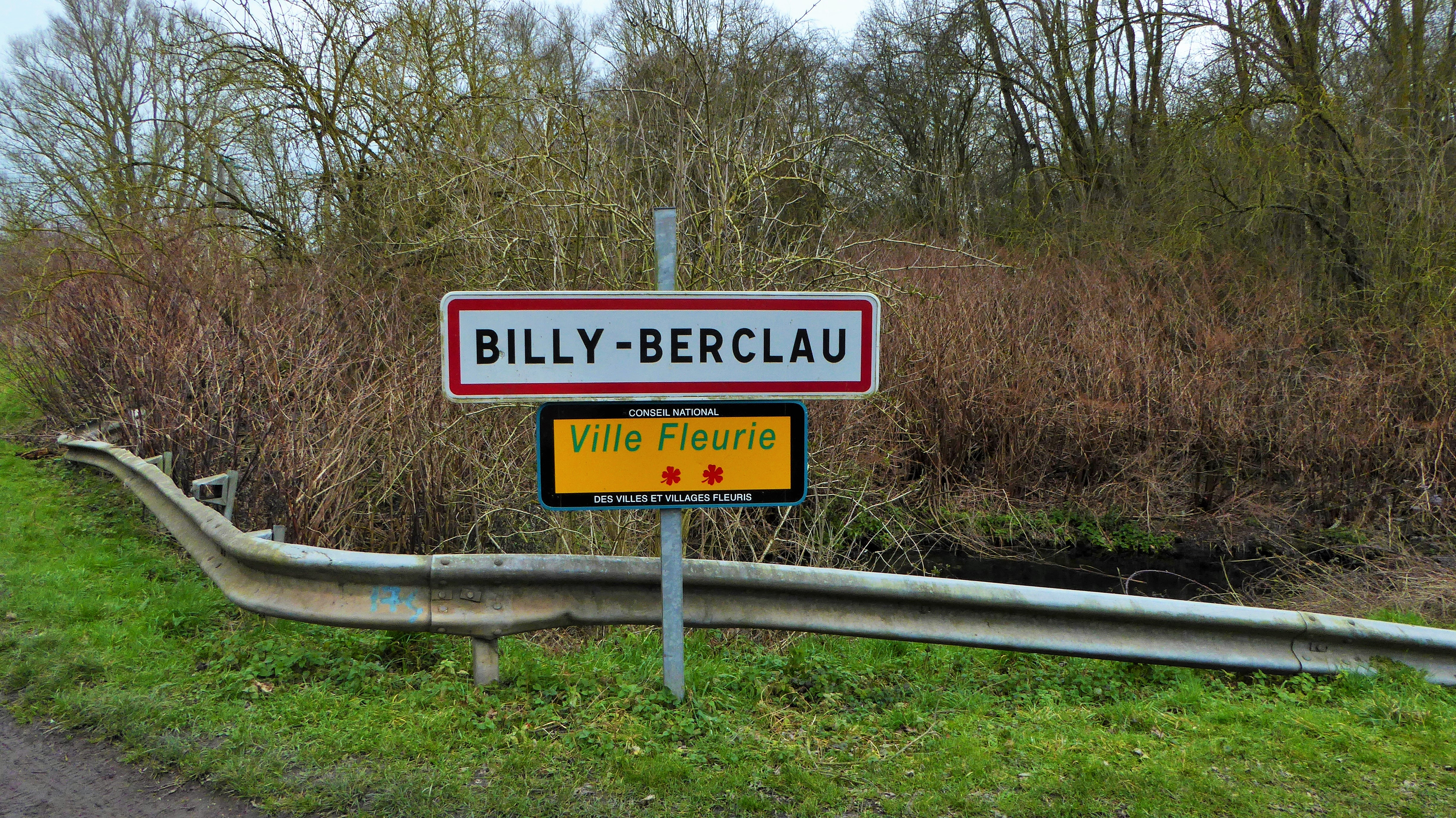 city limit de Billy-Berclau , Pas-de-Calais, Nord-Pas-de-Calais-Picardie France.